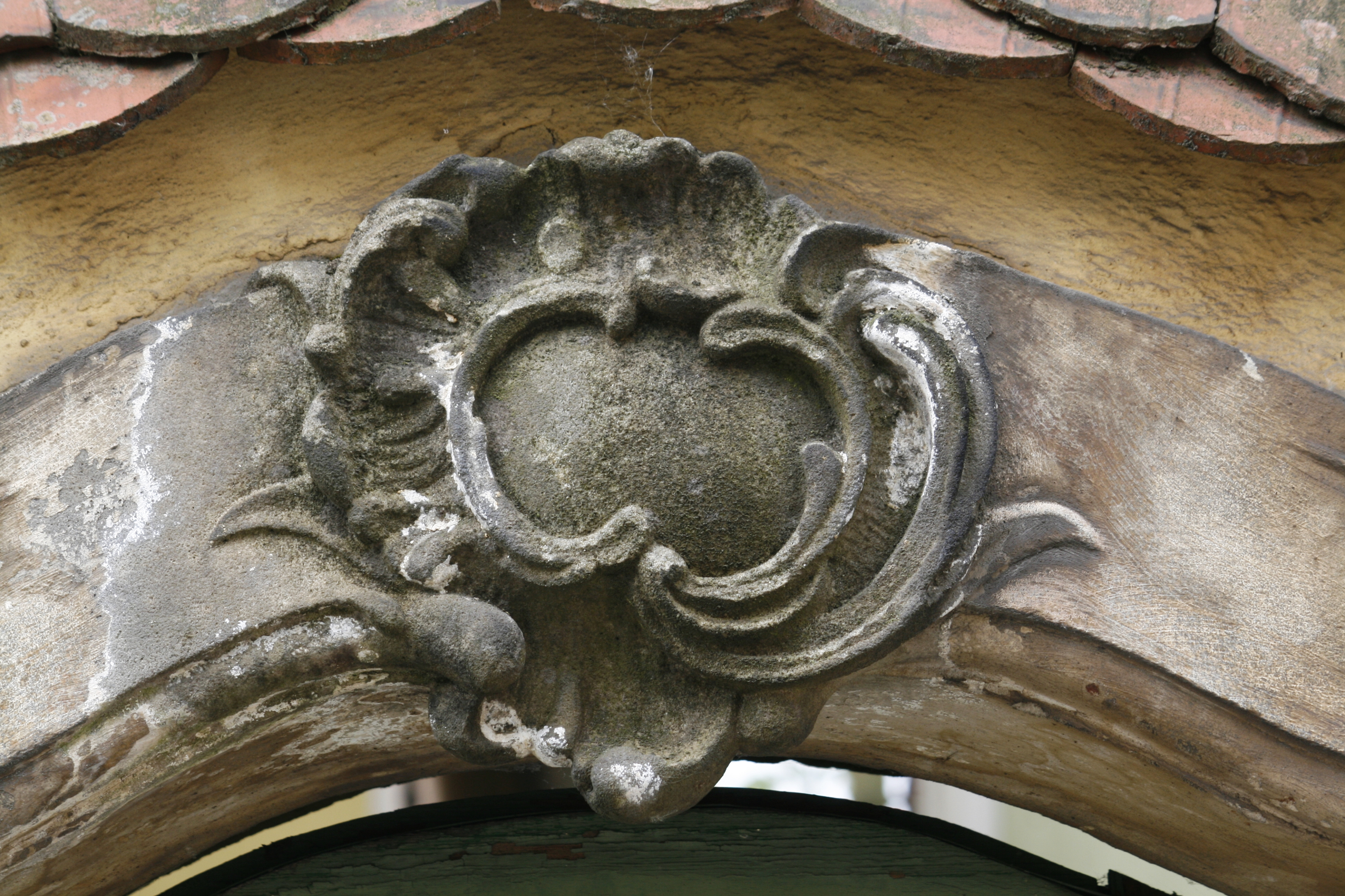 August-Bebel-Straße, Herrnhut